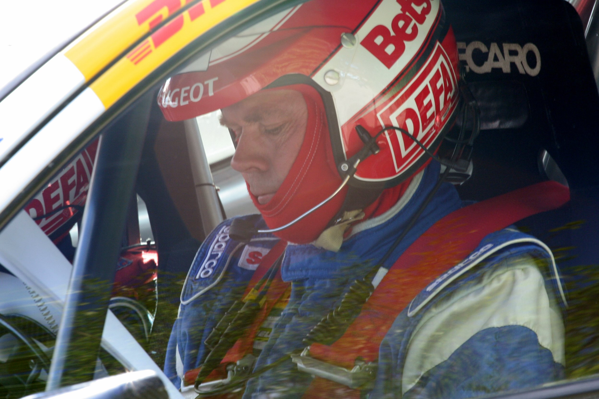 Sebastian Lindholm in Uusikaupunki, Finland